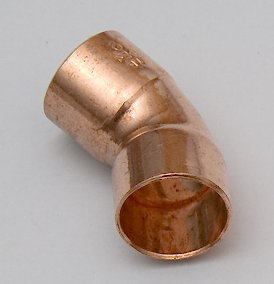 Kupferfitting Typ 5041: Winkel 45° innen-innen